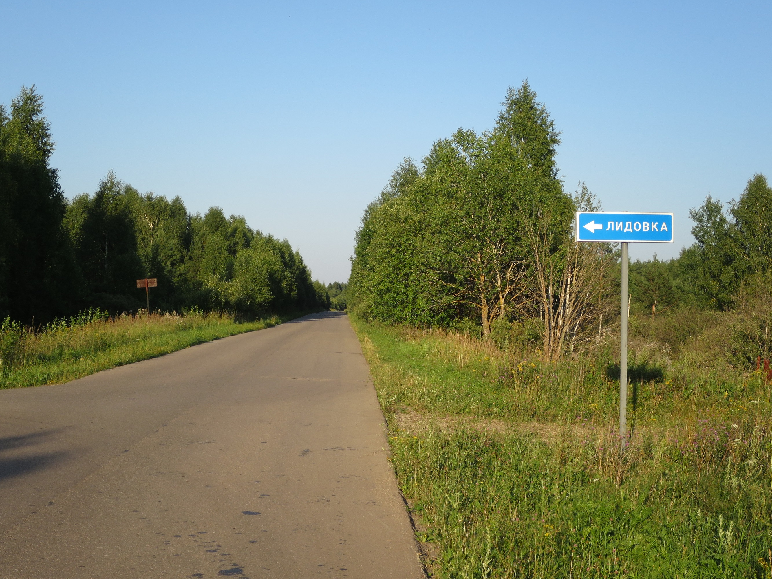 Поворот на Лидовку